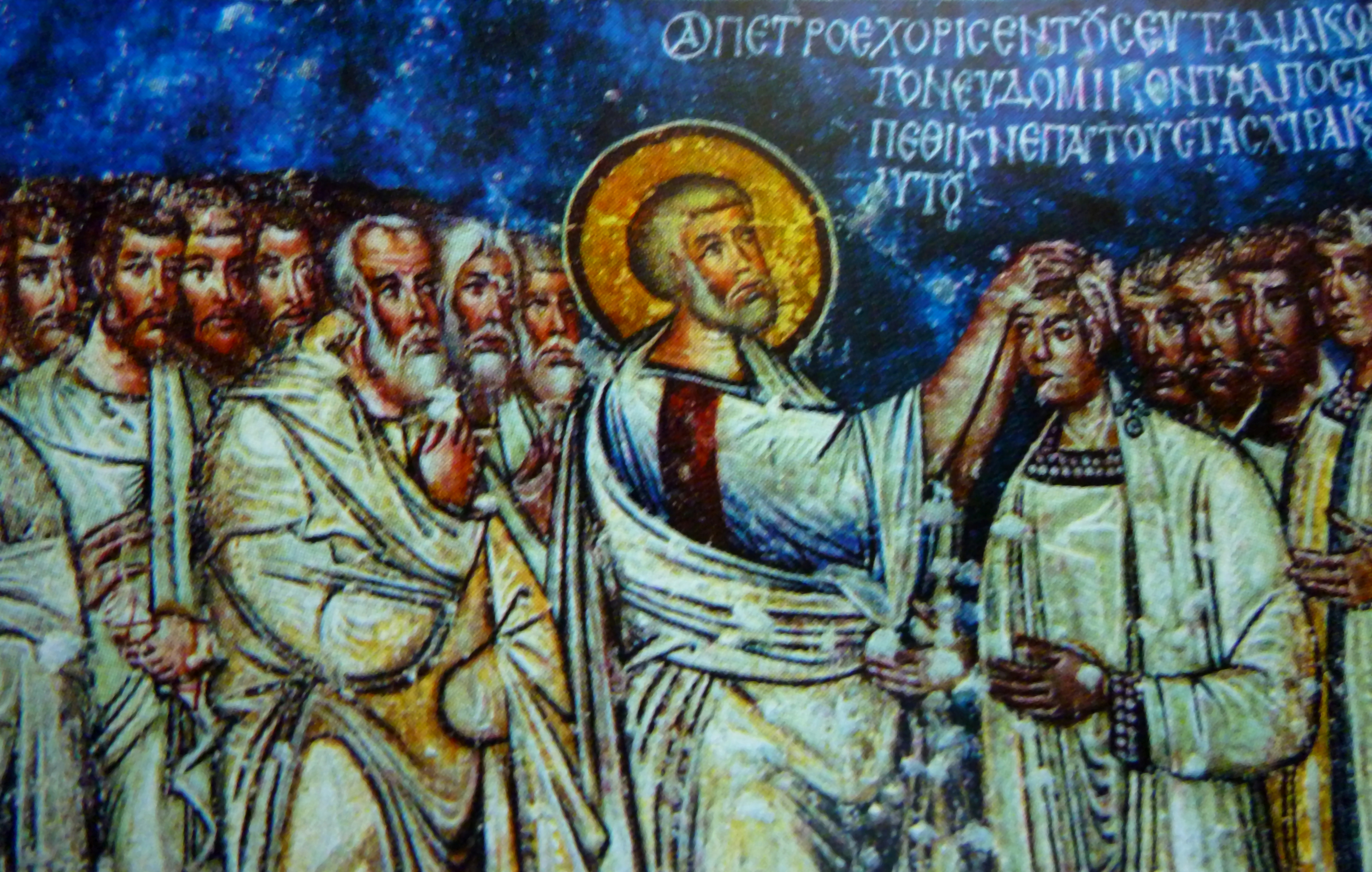 Kappadókia/Göreme Nemzeti Park: Tokali-templom (Tokali kilise)